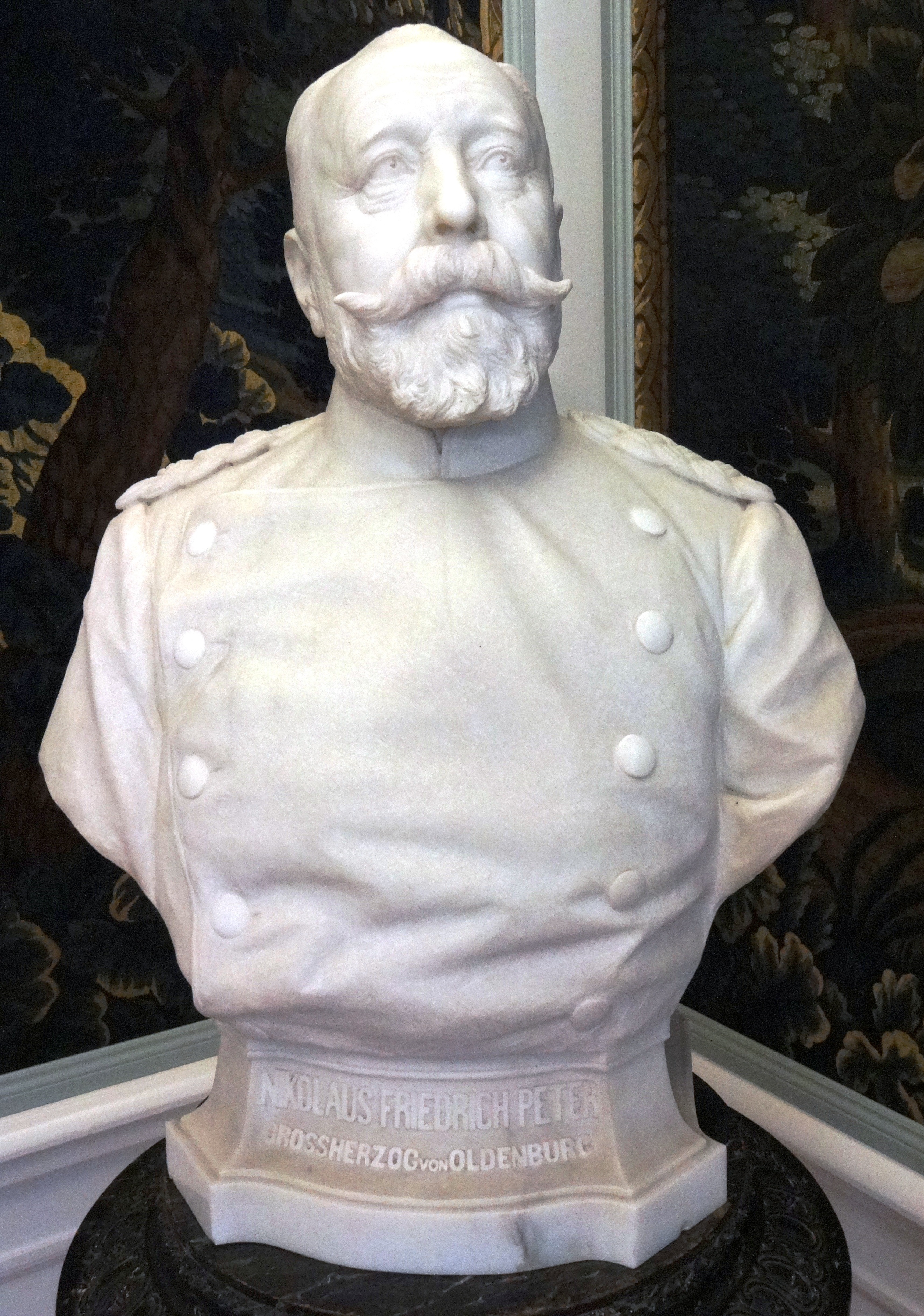 Marmorbüste von Nikolaus Friedrich Peter von Oldenburg, zeitgenössisch, Schloss Eutin